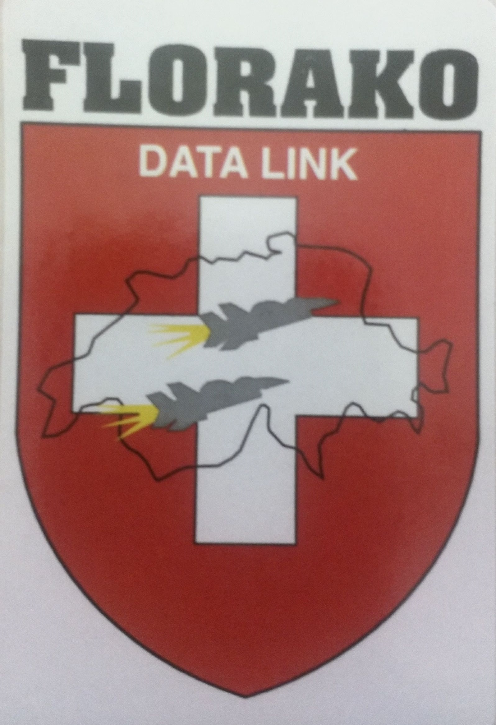 FLORAKO Insigna. Staatliches Wappen = Gemeinfrei. Einfache Darstellung, Keine Schöpfungshöhe State coat of arms = public domain. Simple representation, no height of creation